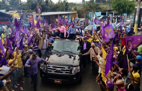 La Primera Dama y Danilo Medina juntos en una marcha caravana alrededor de la República Dominicana